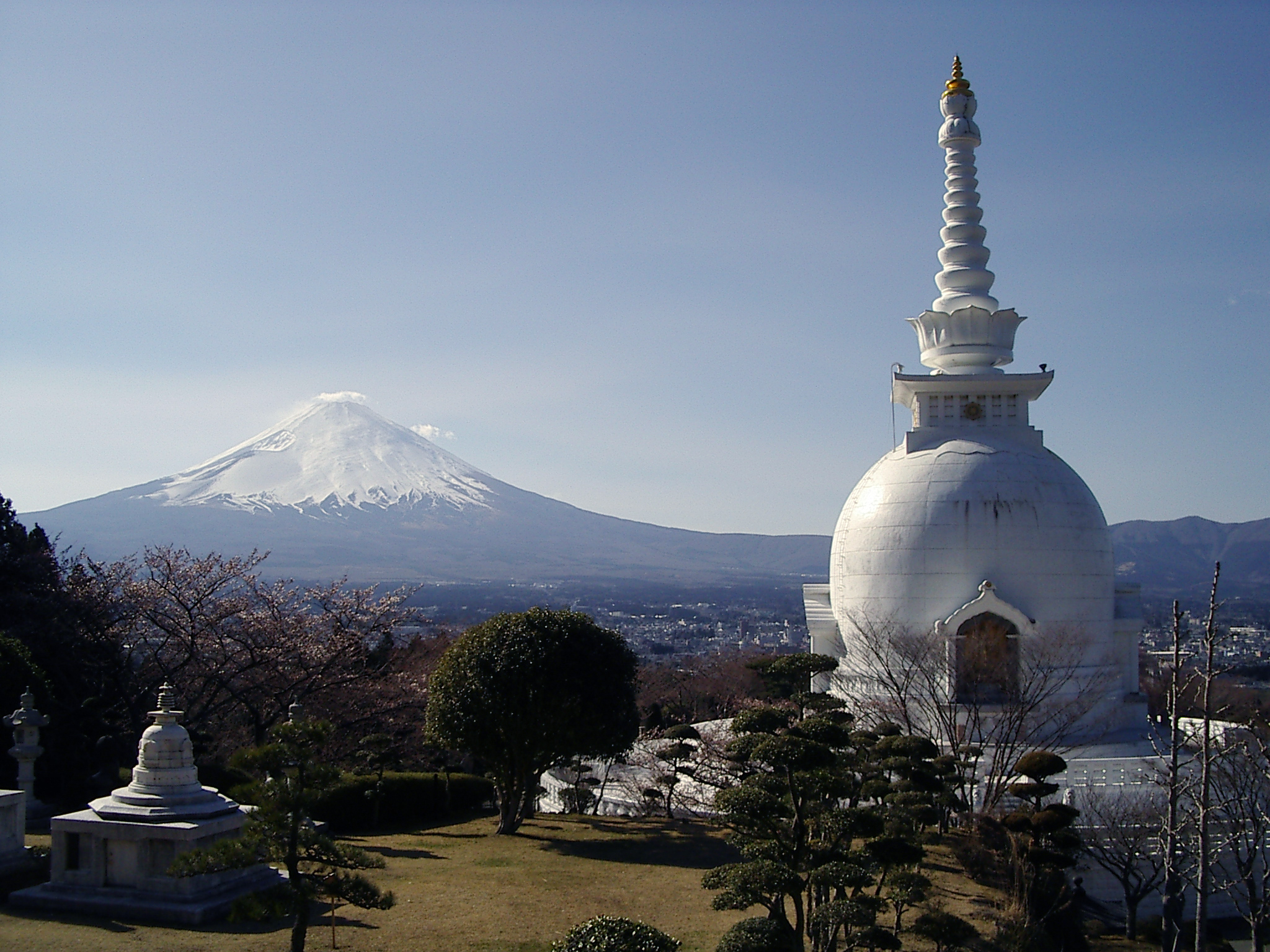 静岡県御殿場市の富士山と仏舎利塔 Stupa and Mt.Fuji in Gotemba, Shizuoka, Japan.